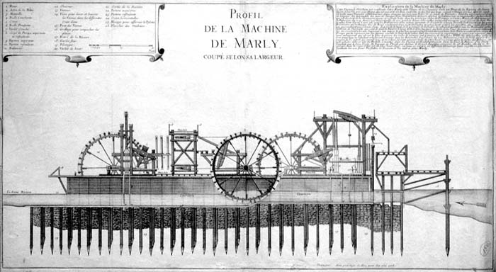 Querschnitt durch die Maschine von Marly aus "Beautés de la France", Nicholas de Fer, 1705-1724